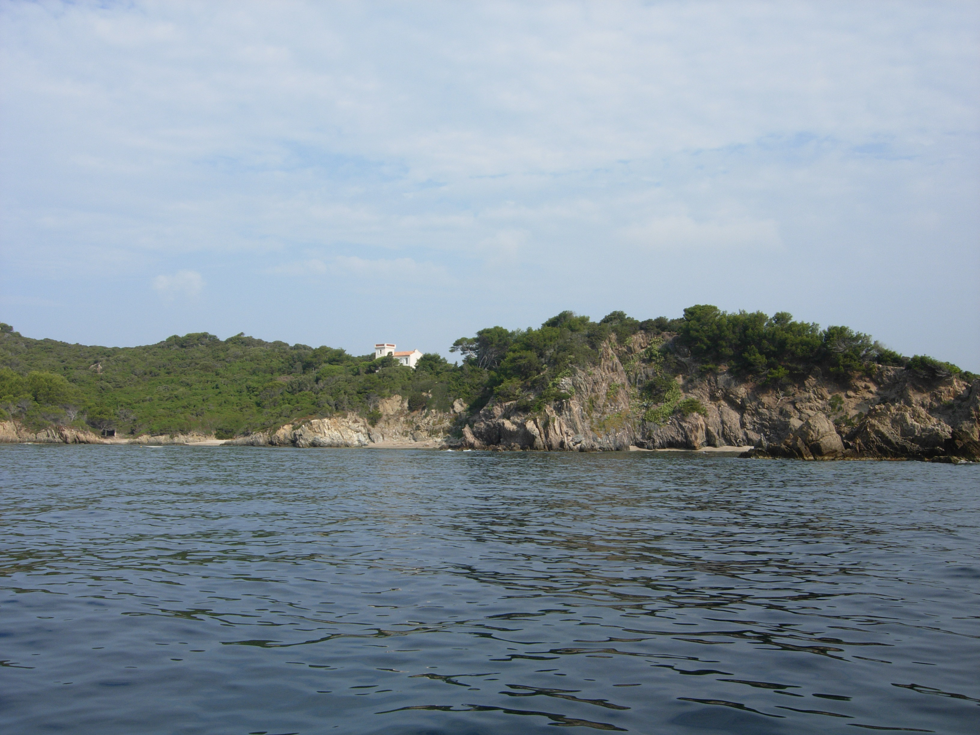 Île du Grand Ribaud - Le Cap de la Citerne et la maison